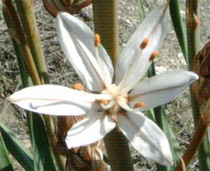 Asphodelus albus